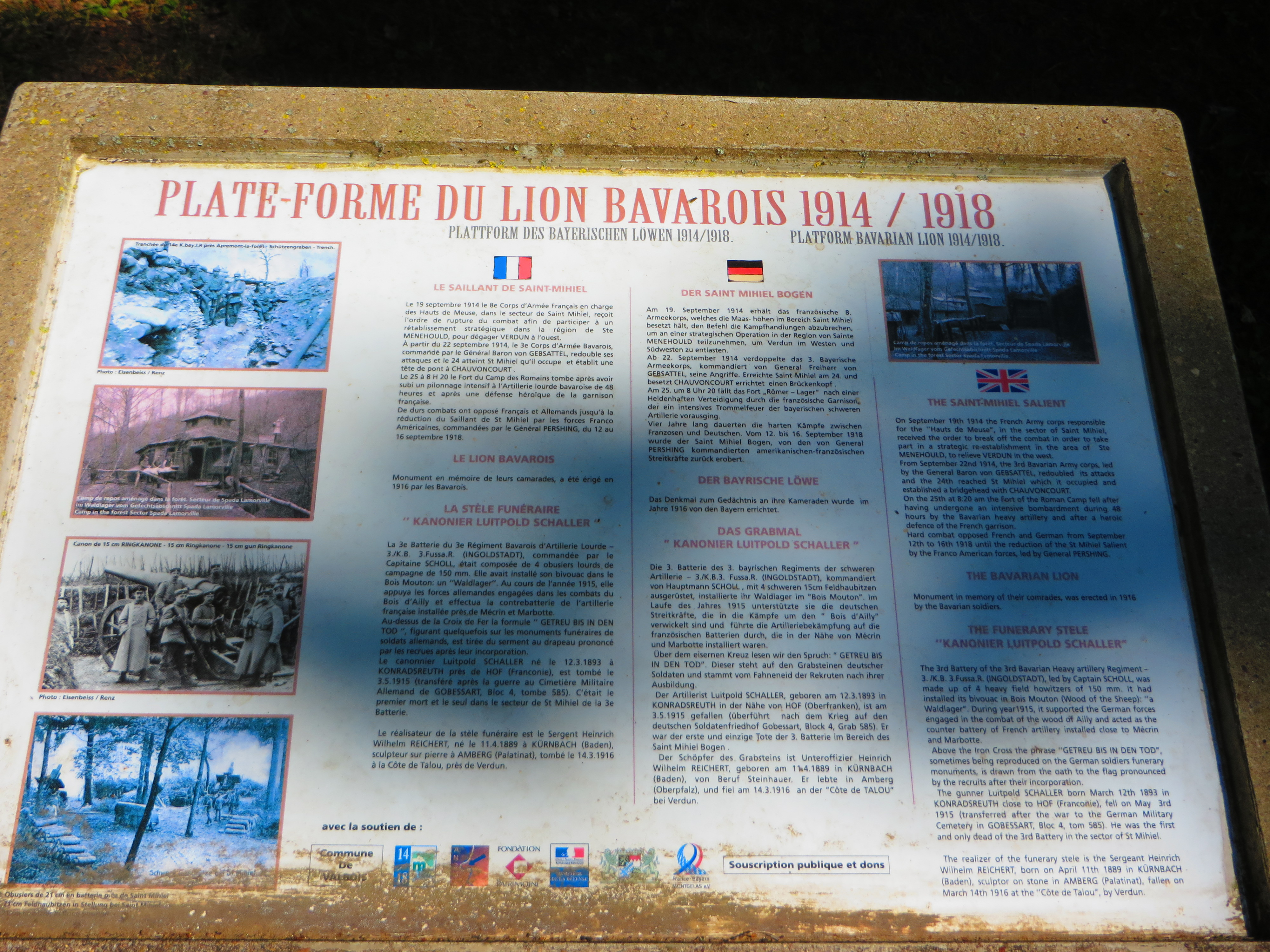 Valbois plaque explicative